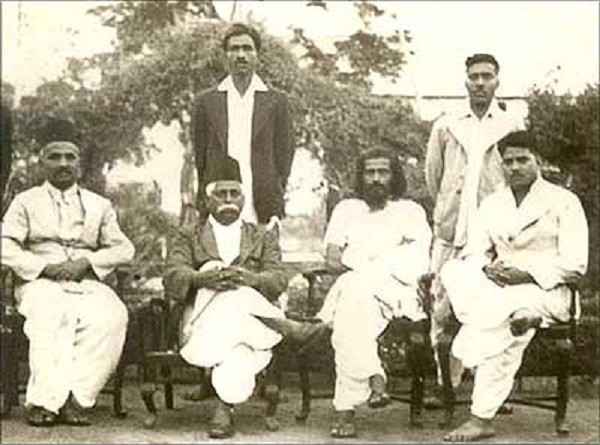 RSS meeting in 1939